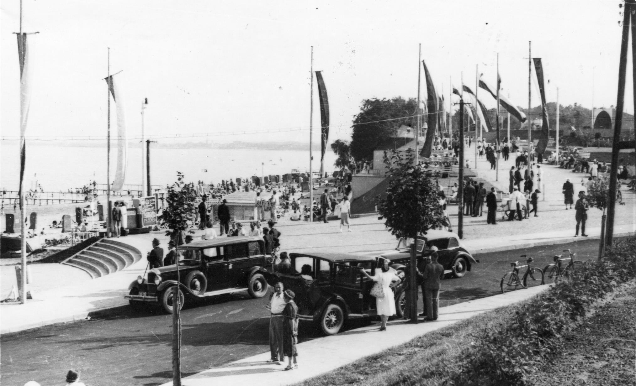 Plaża, łazienki oraz amfiteatr w miejscowości Gdynia-Orłowo w Polsce w 1938. Liczne polskie flagi i widok na Sopot.